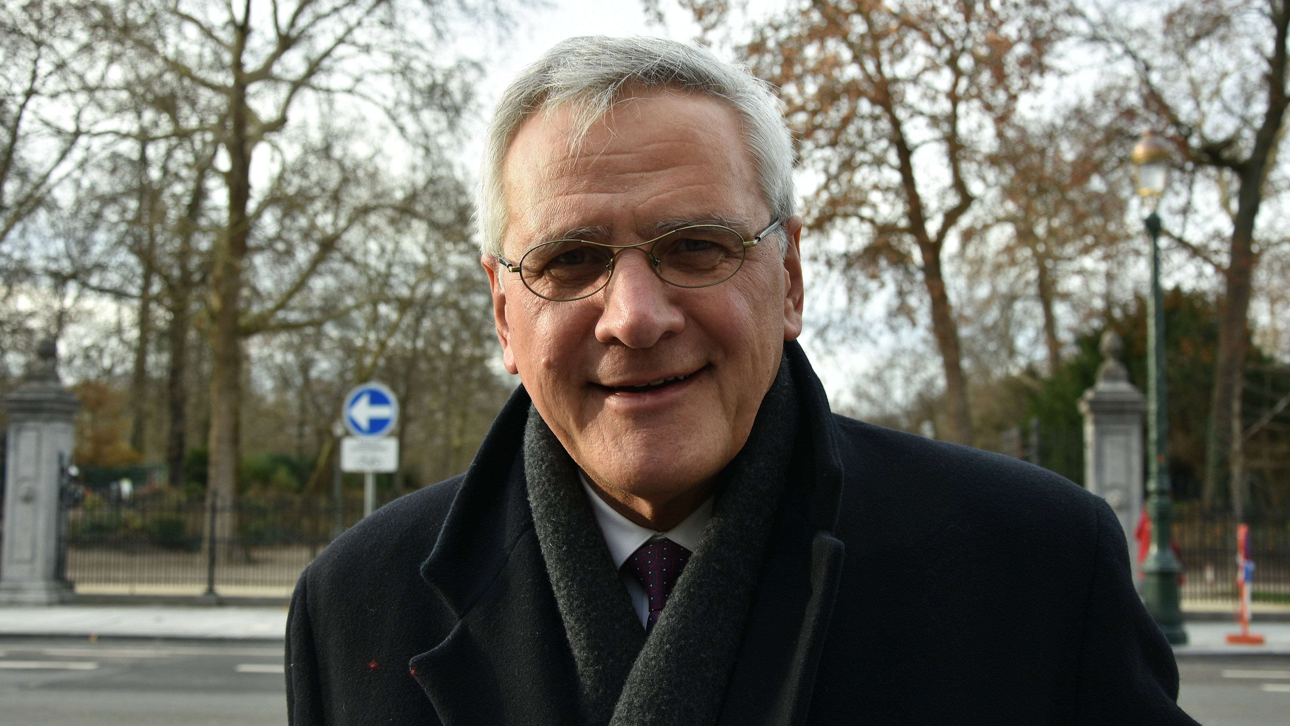 Kris Peeters tijdens zijn laatste uren als vice-premier Brussel 18-12-2018 15-05-36